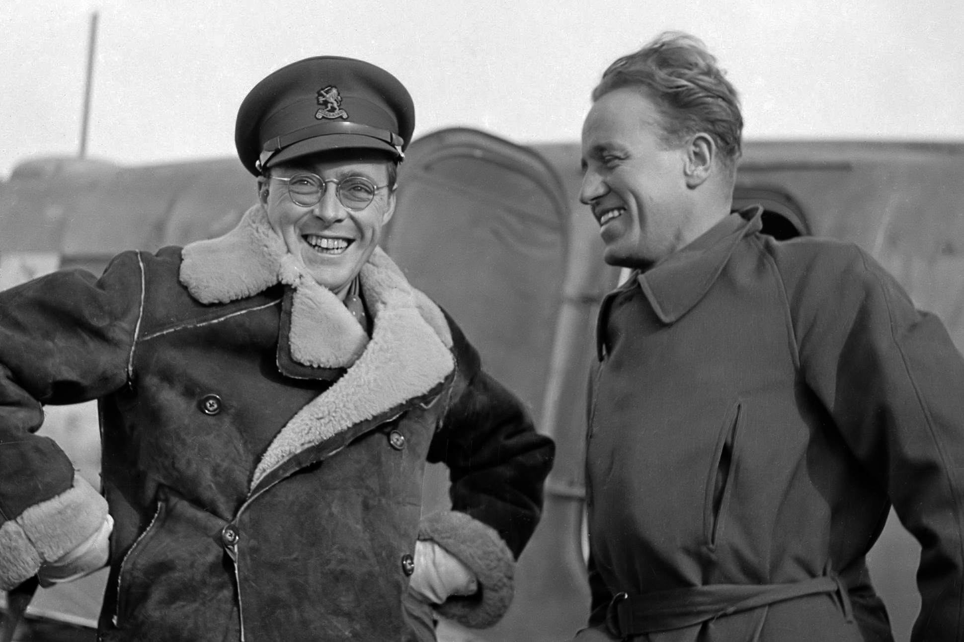 Prins Bernhard met co-piloot Gerben Sonderman bij een vliegtuig ongedateerd